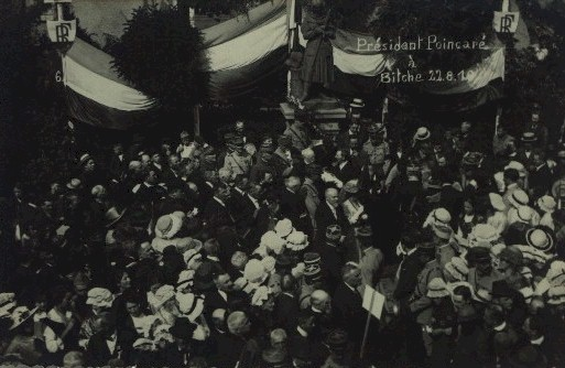 Visite de Président Poincaré à Bitche en 1919